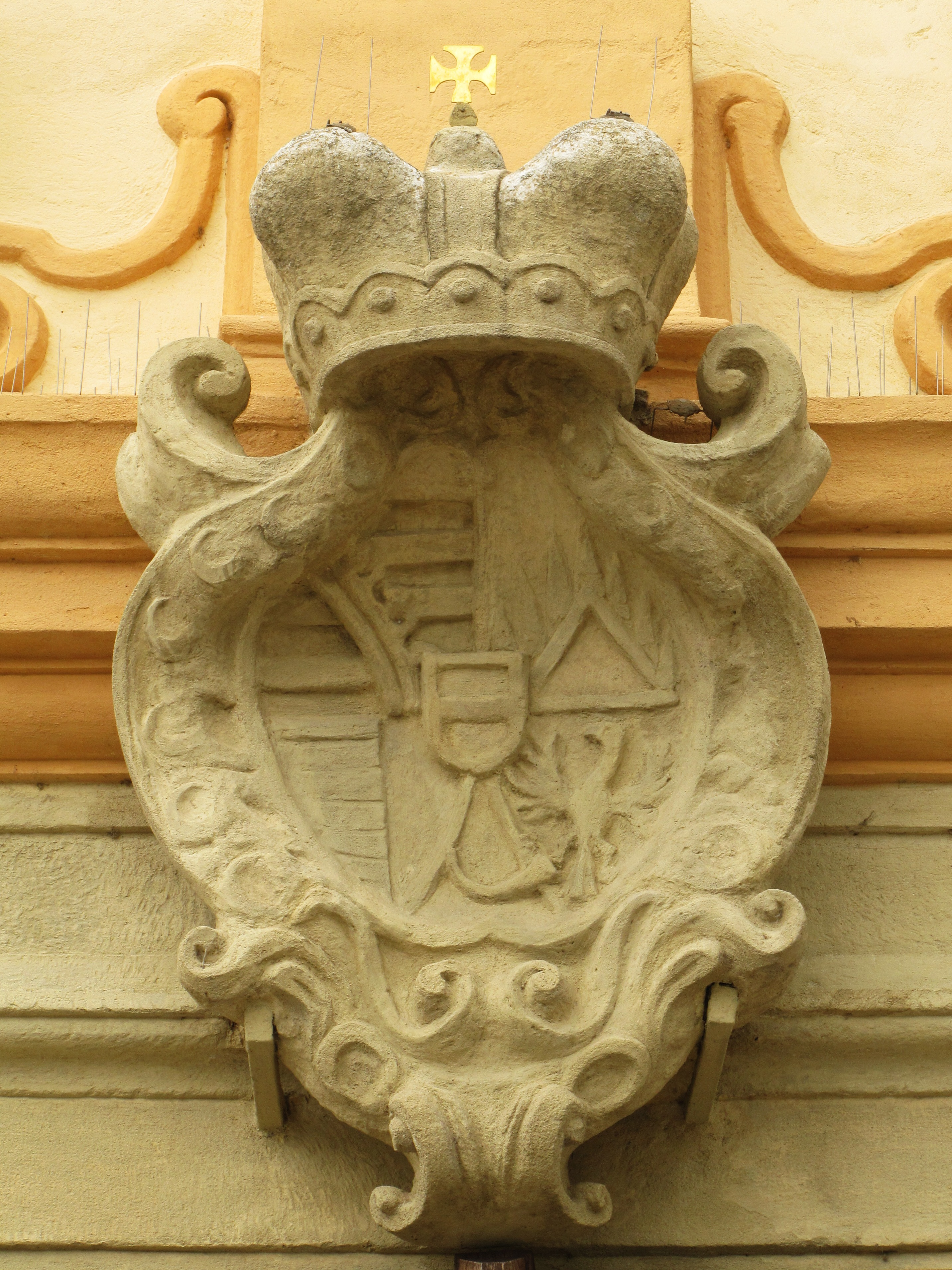 Lichtenštejnský erb nad vchodem do kostela Nanebevzetí Panny Marie v Kyjově. Lichtenštejnové poskytli peníze na výstavbu kostela a jsou jeho zakladatelé a patroni.